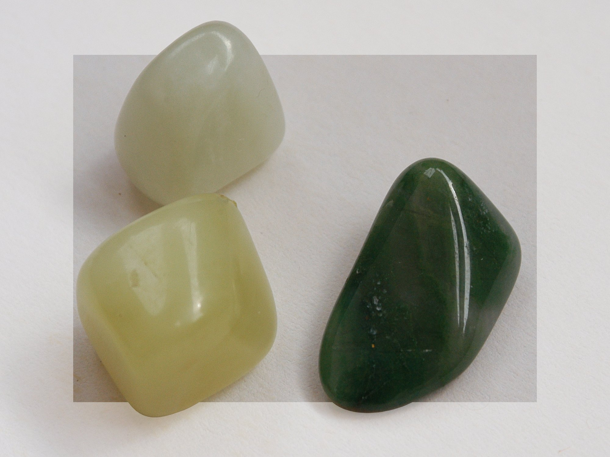 Jade